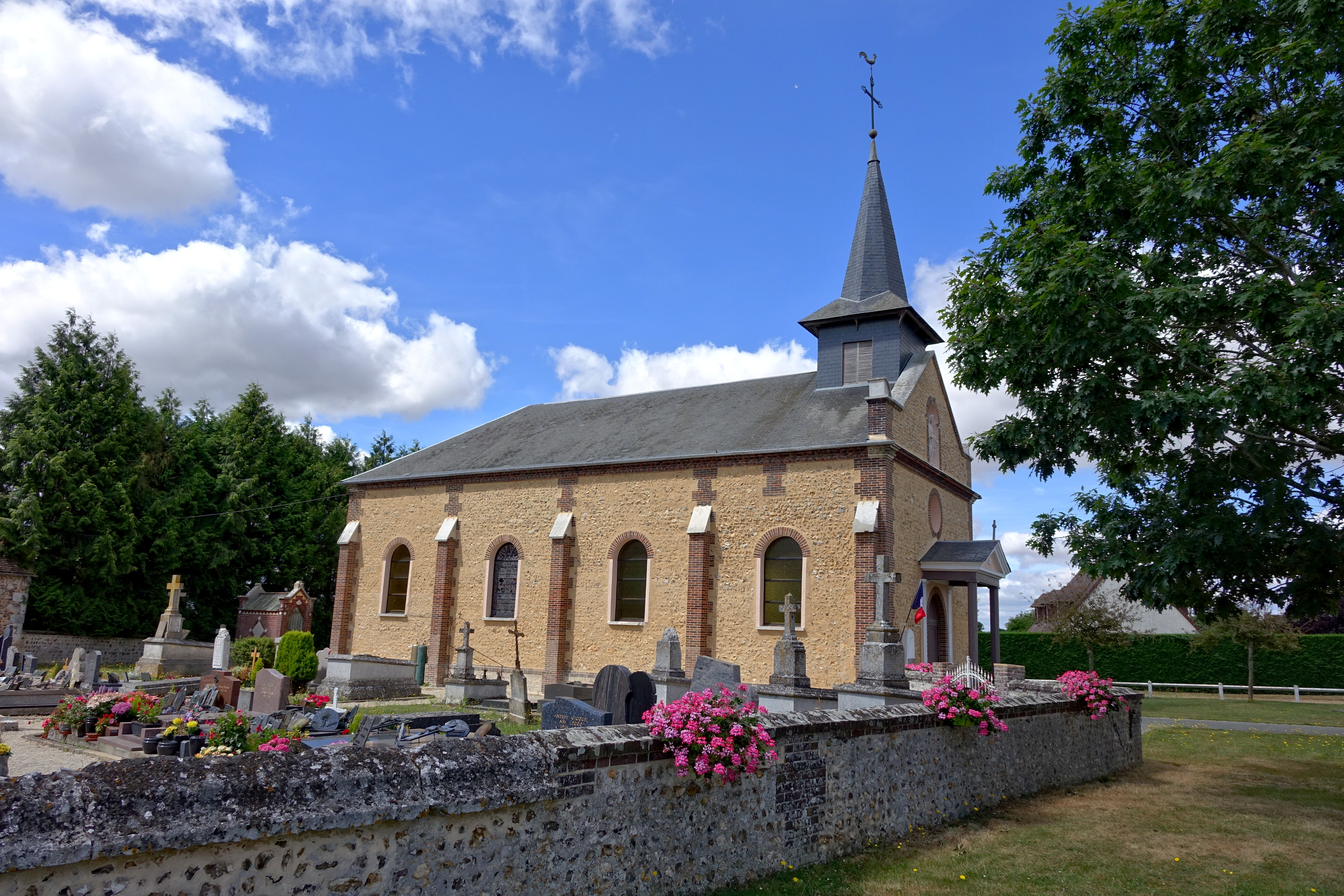 Église Saint-André à Parville, Eure, France